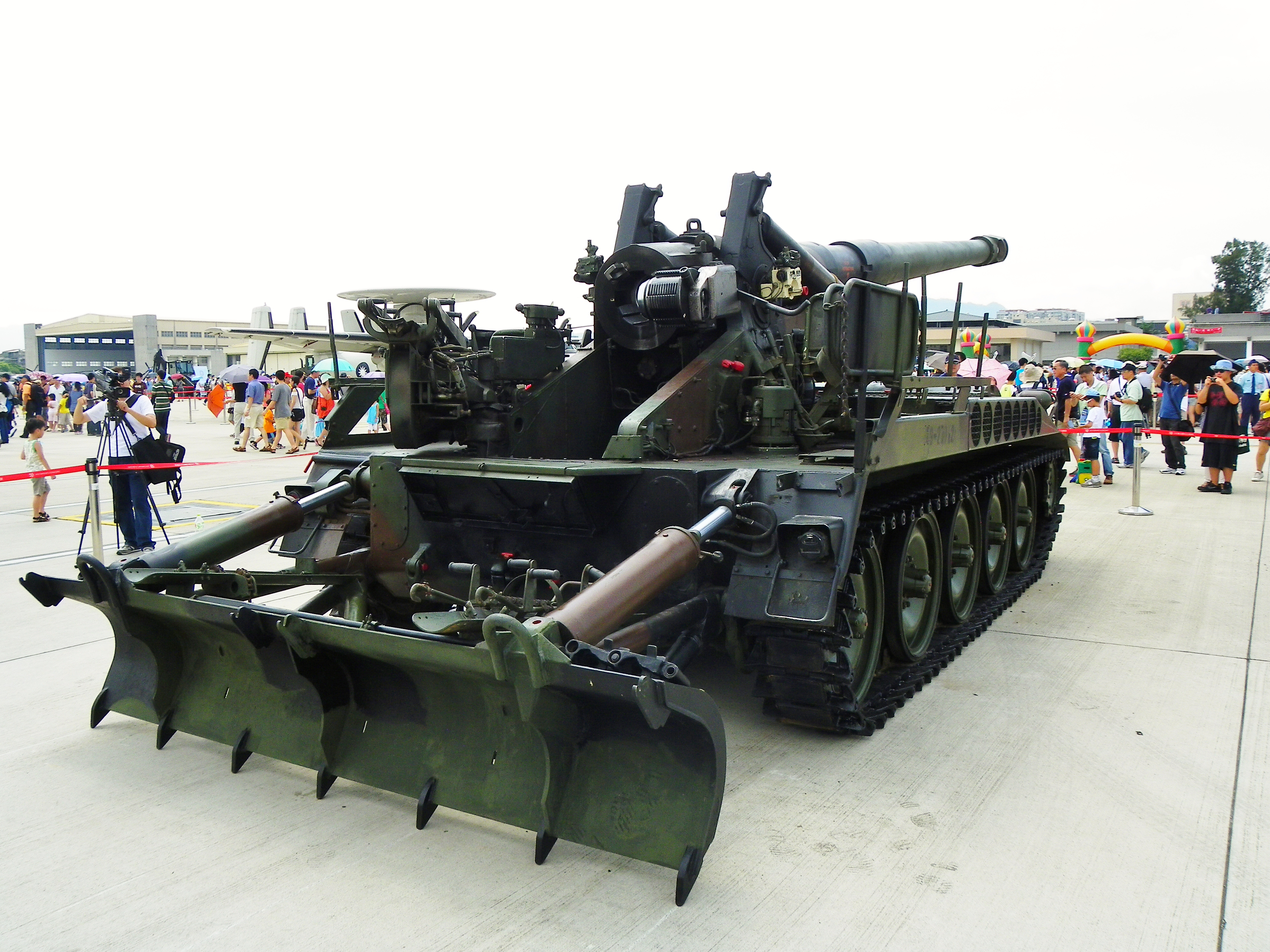 後方所見M110A2 203mm自走榴彈砲砲尾，攝於2011年空軍松山基地營區開放活動。